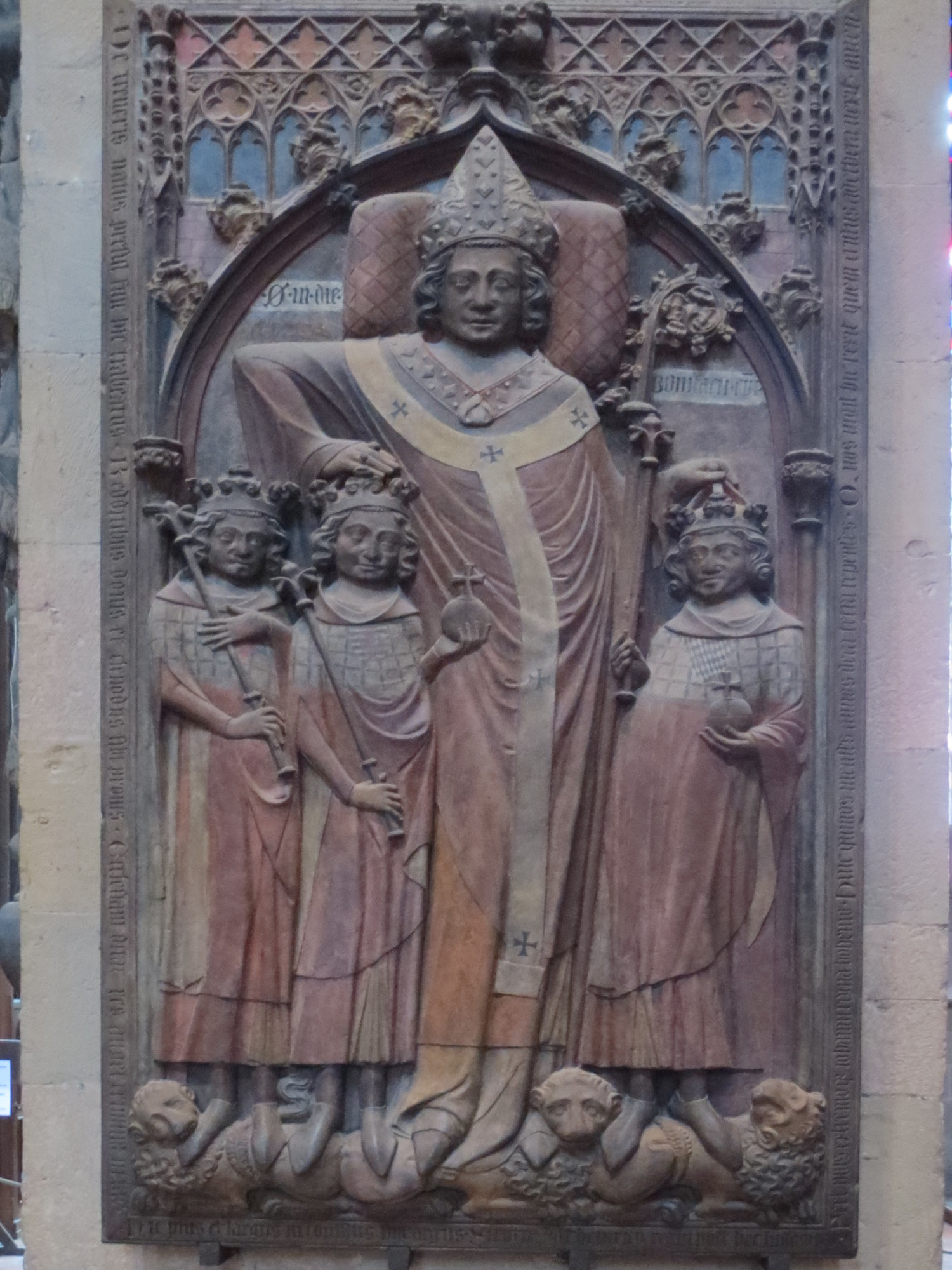 Mainzer Dom